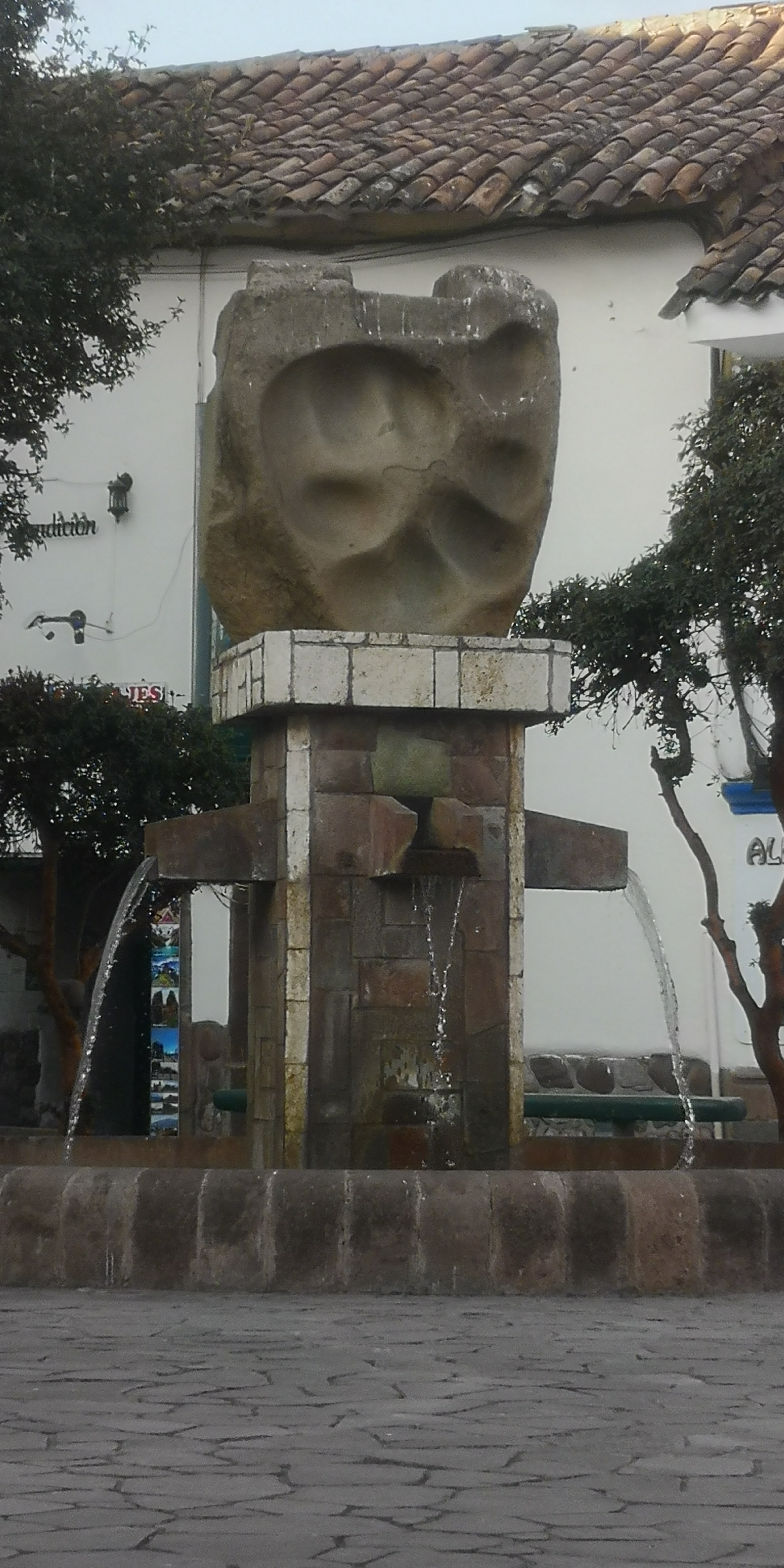 Vista del monumento lítico de la huella en la plaza Limacpampa chico, Cusco, Perú